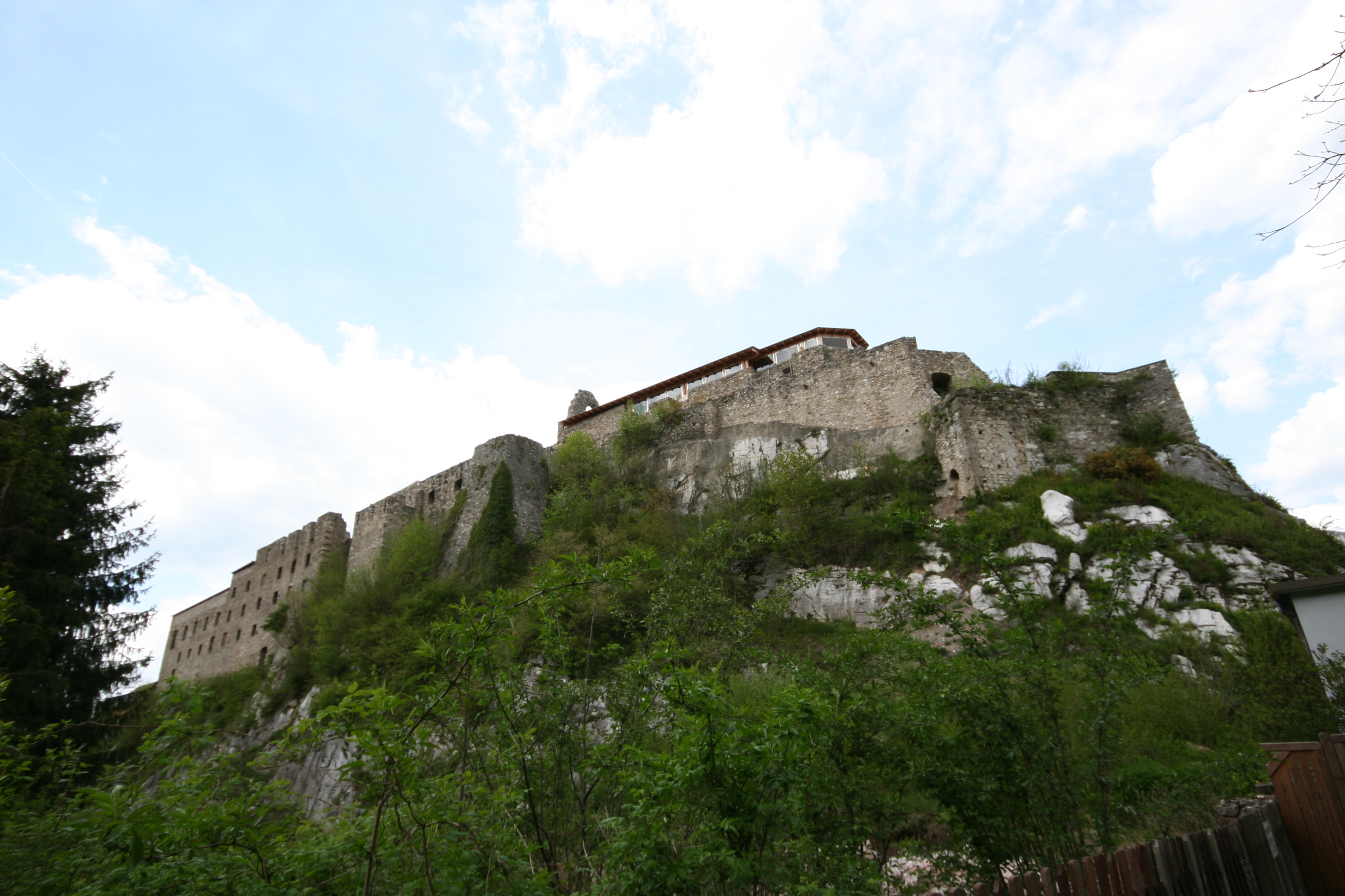 Klosterruine Arnoldstein